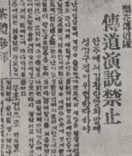 이화여전 내 기독교 전도단인 이화전도대의 선교 금지 관련 기사